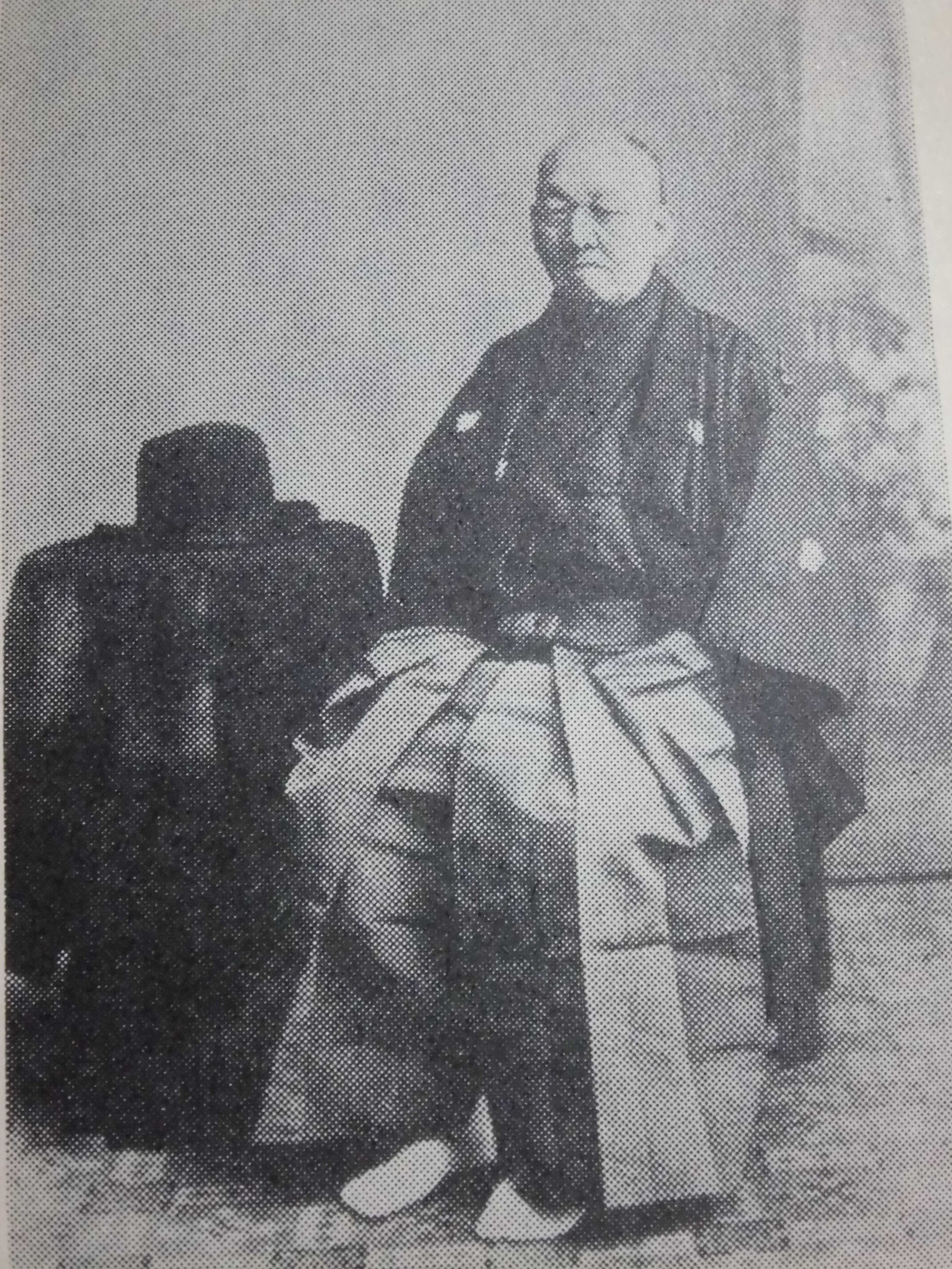 信夫 恕軒（Shinobu Zyoken）